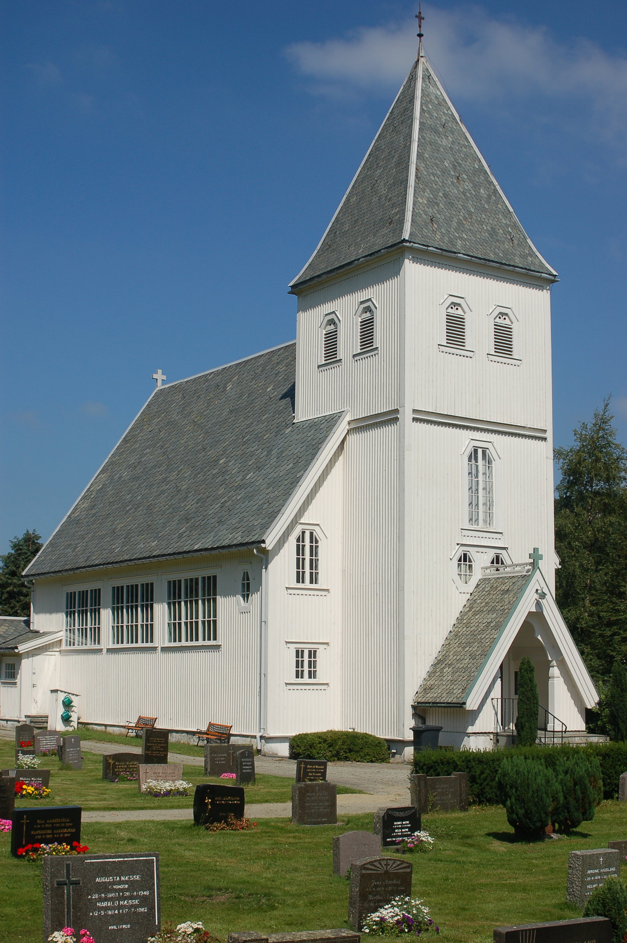 Ålgård Kirke (Church), Gjesdal, Rogaland, Norway